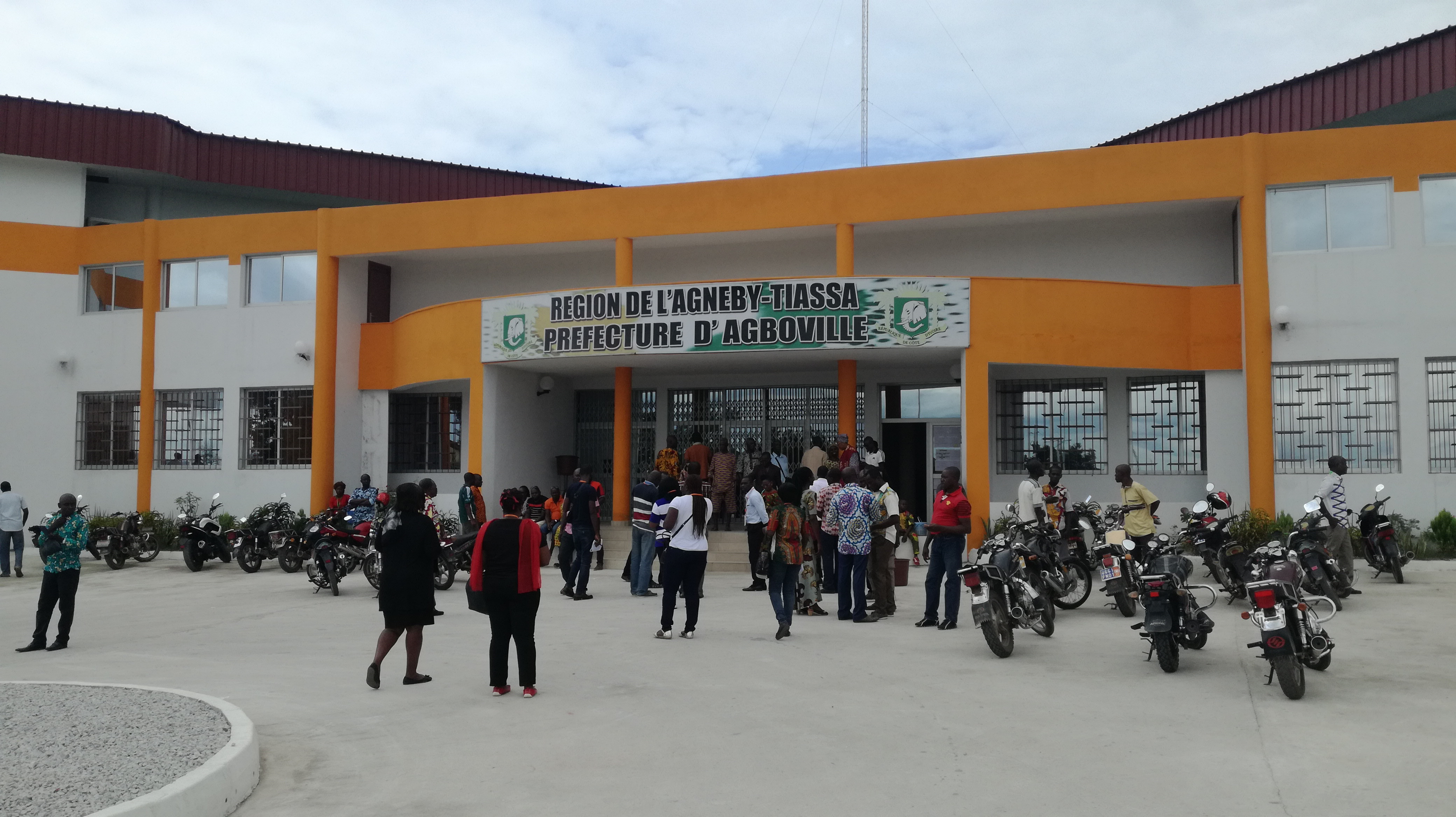 Esplanade des locaux de la préfecture de la ville d’Agboville, en Côte d’Ivoire